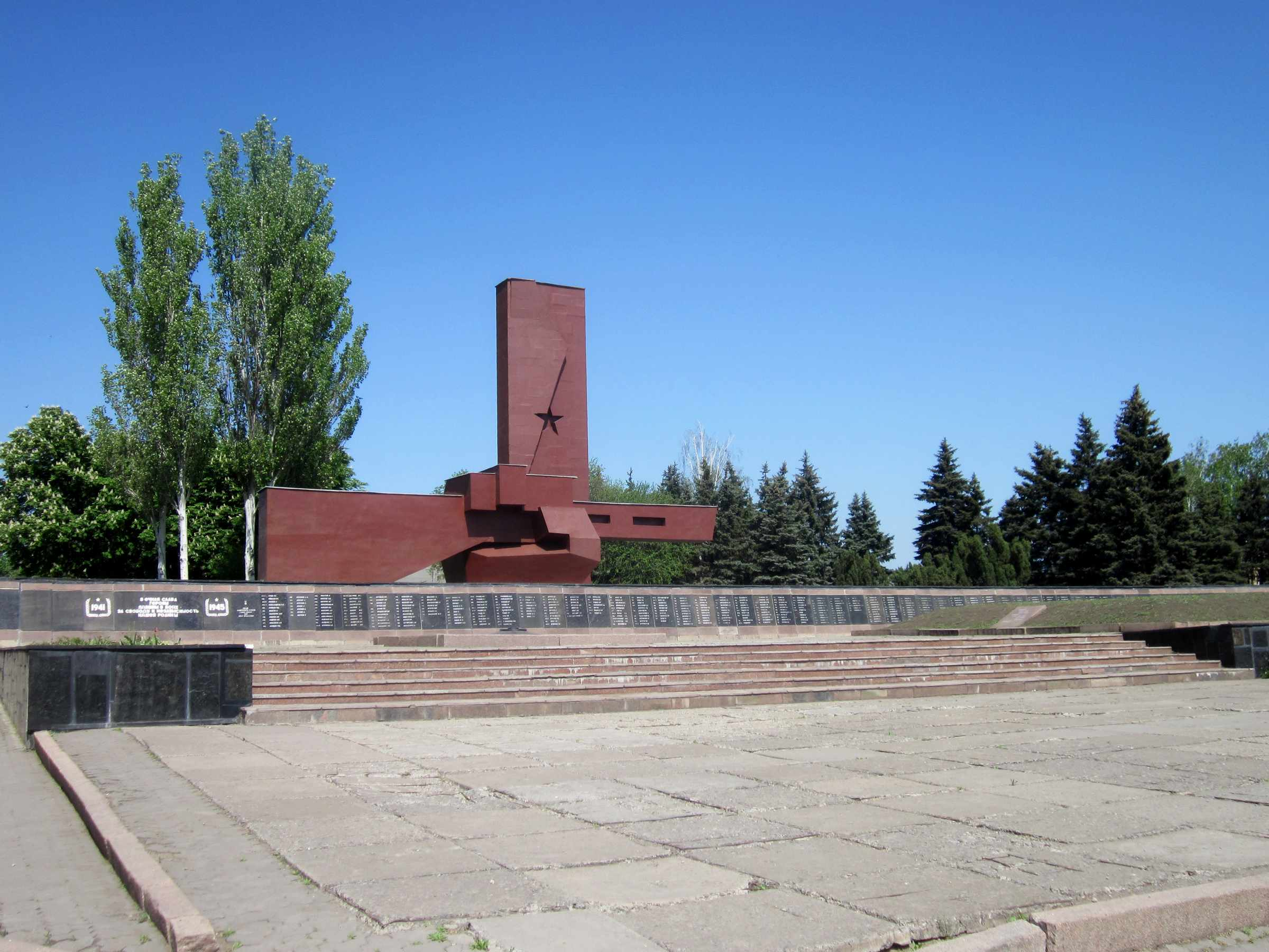 Братська могила «Не пройдуть», Кривий Ріг, пл. 40 річчя Перемоги, сквер